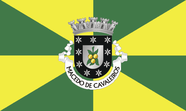 Bandera del municipio.